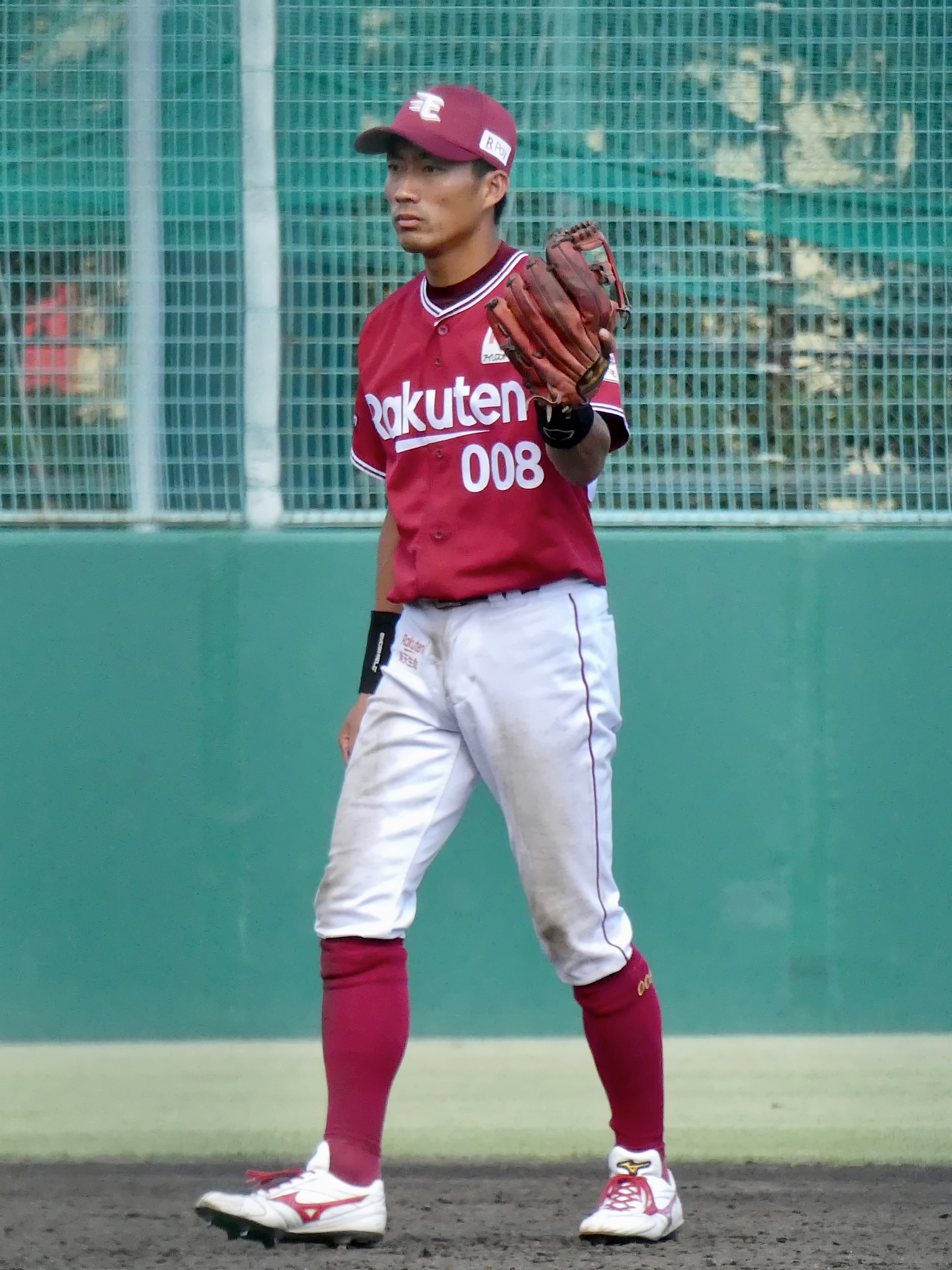 東北楽天ゴールデンイーグルスの選手「吉持亮汰」。ロッテ浦和球場にて。